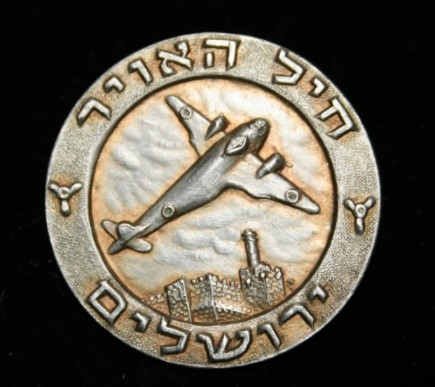 סמל להנצחת פעילות חיל האוויר